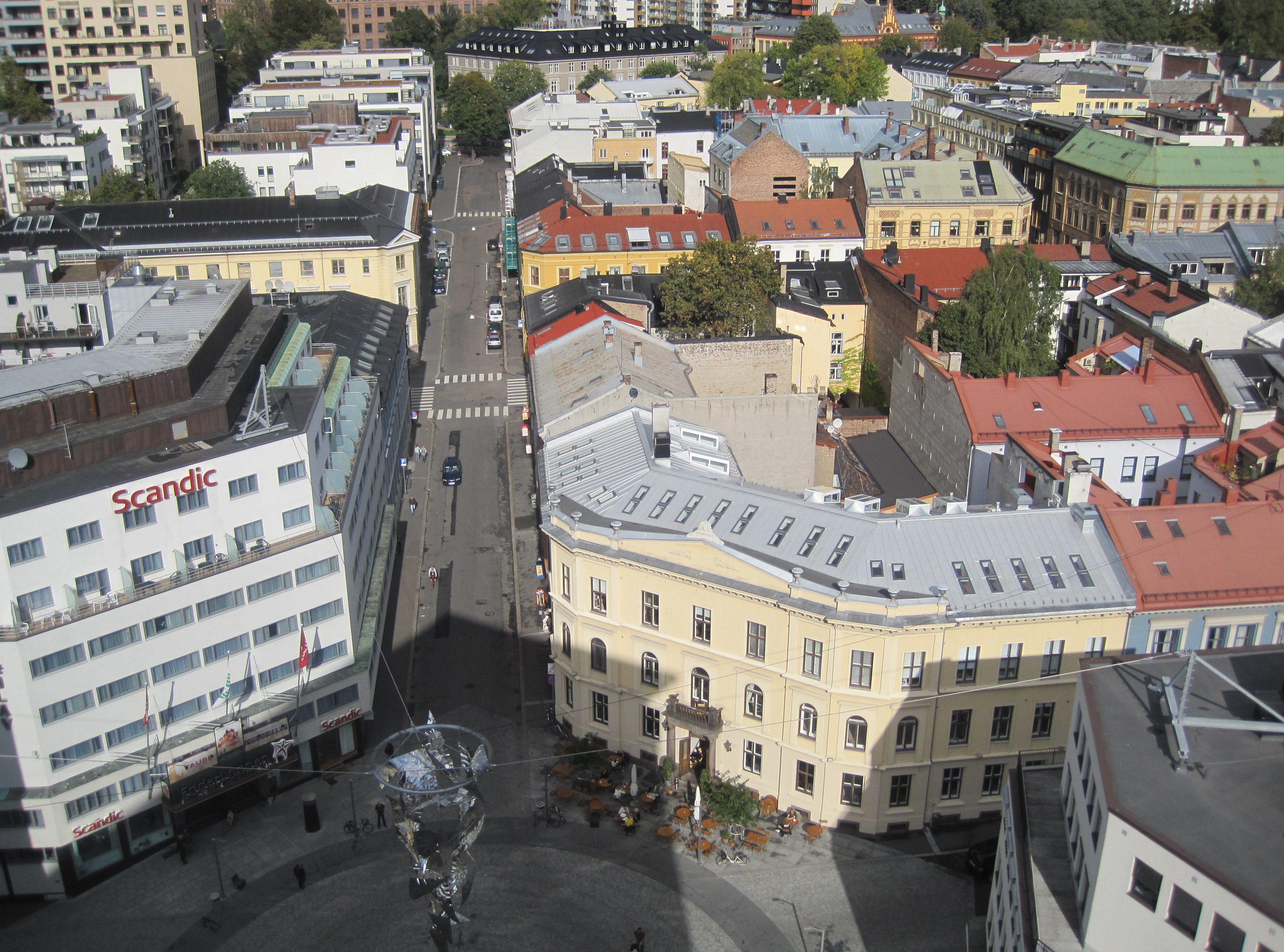 Utsikt fra Universitetsgata 2, Oslo, i 2009. Høyblokken her er fra 1962, er 56 meter høy, og brukes i dag av Helsedirektoratet. Bildet viser utsikten ned mot St. Olavs plass. Gaten som går bakover i bildet, er Langes gate. Bildet viser også Scandic Hotell Edderkoppen, St. Olavs plass 1.